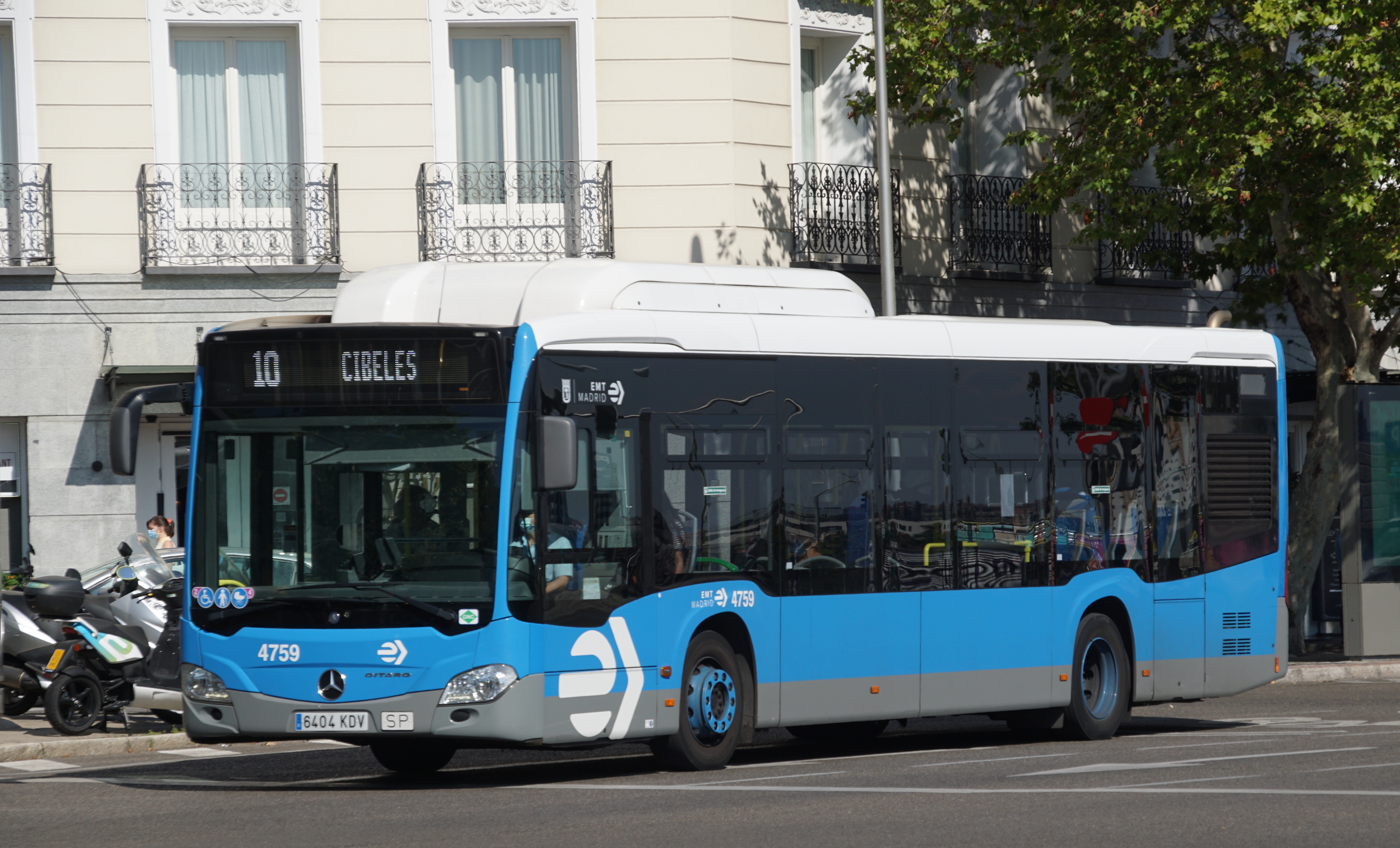 10 EMT Madrid junto a la estación de Atocha, agosto 2020